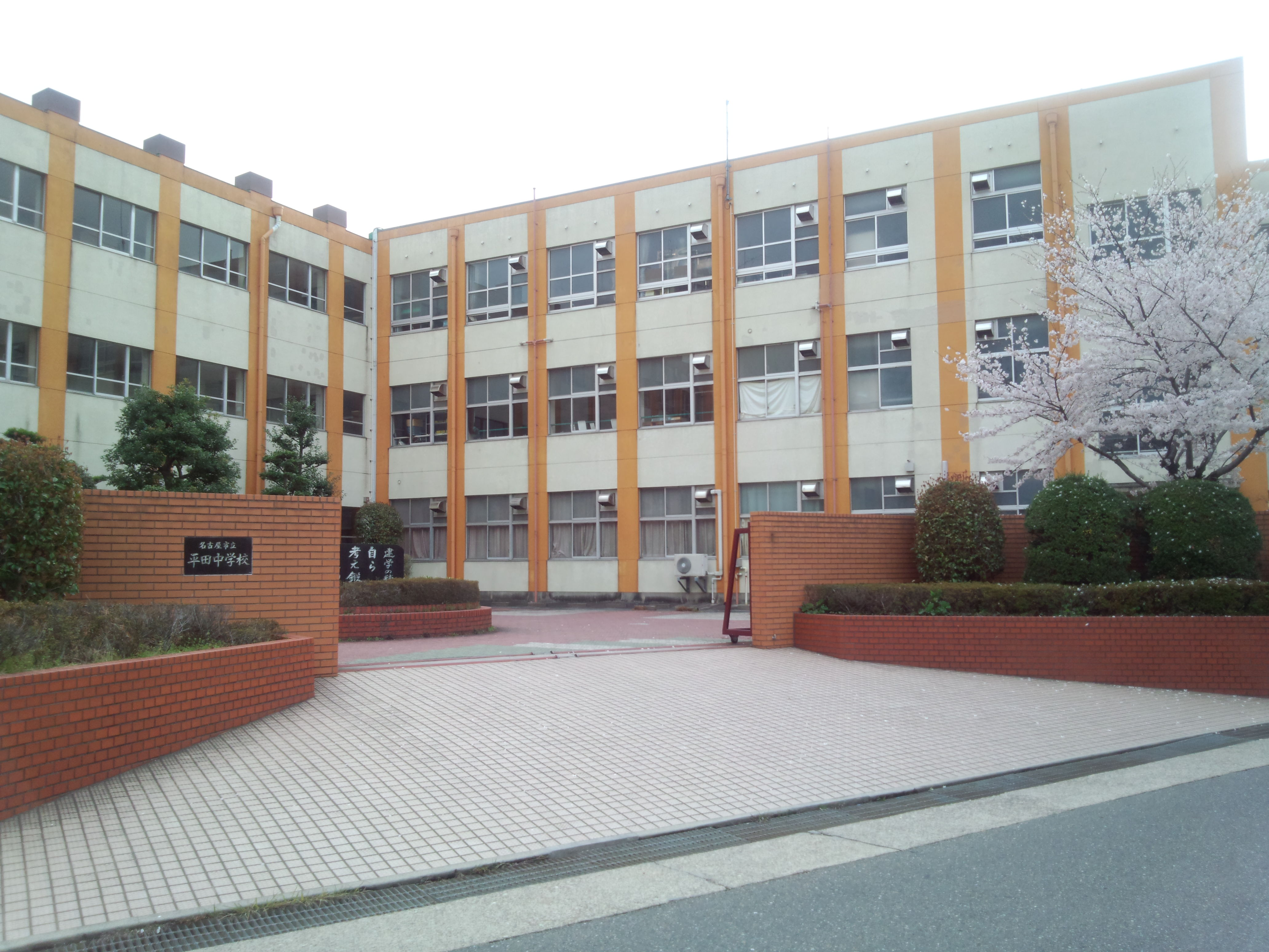 名古屋市立平田中学校正門（校地北側に所在）を写す